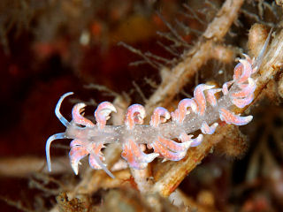 Phyllodesmium poindimiei, Osezaki, Japón